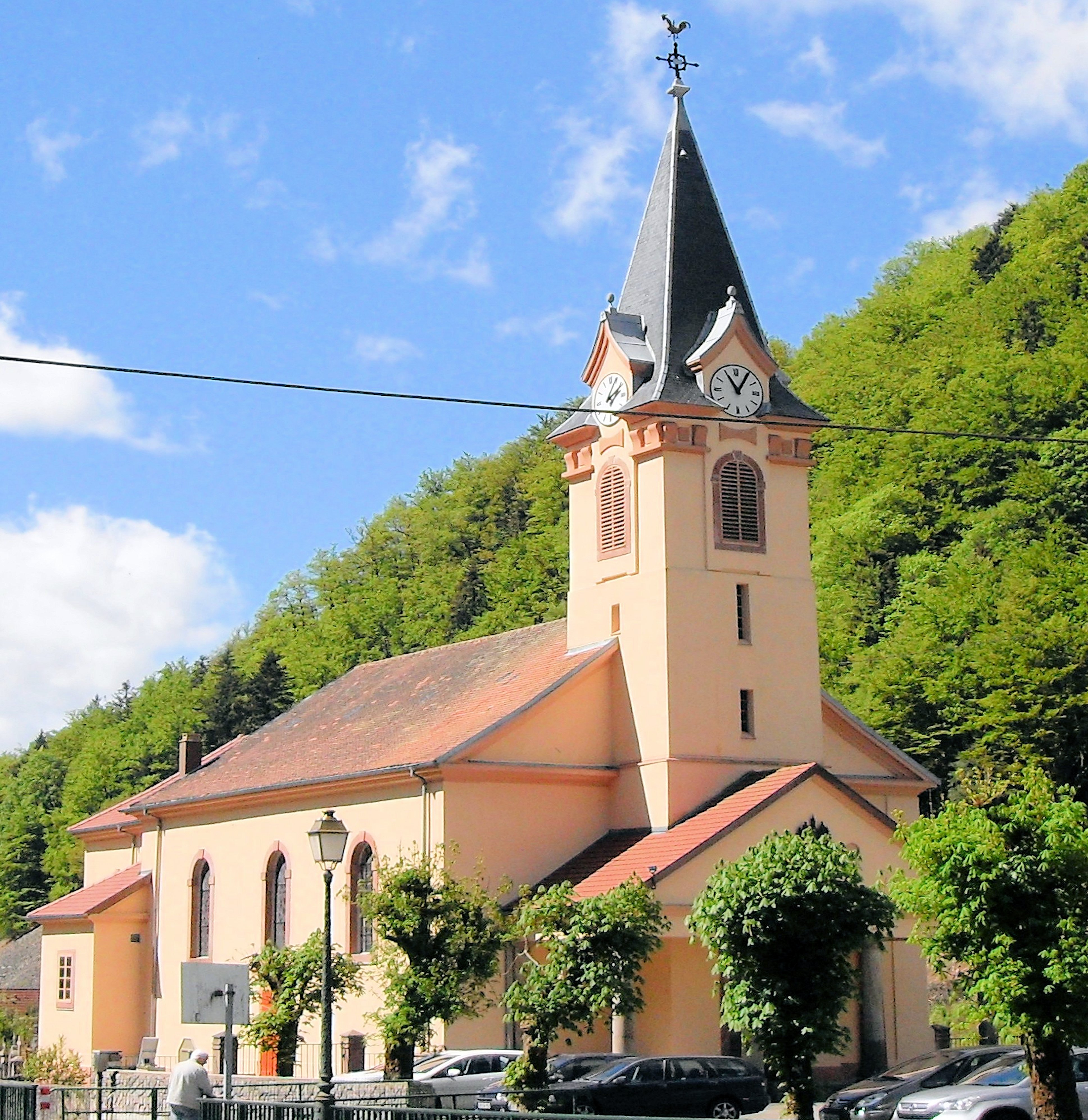 L'église Saint-Pierre et Saint-Paul à Wildenstein